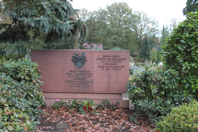 Familiengrab der von Helldorffs, mit der Grabstelle von Wolf-Heinrich Graf von Helldorff, auf dem Friedhof in Tangstedt/Kreis Stormarn, Schleswig-Holstein.